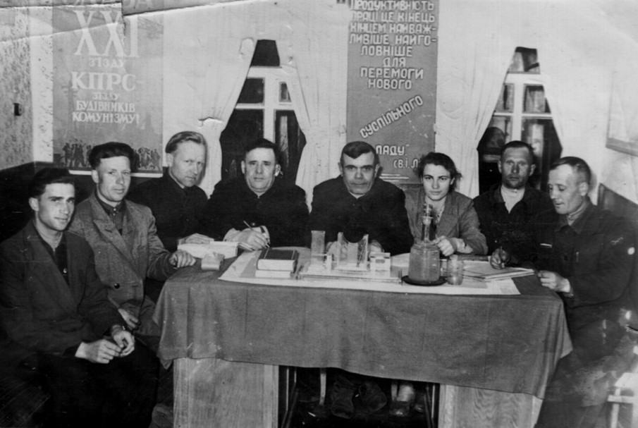 Президія зборів